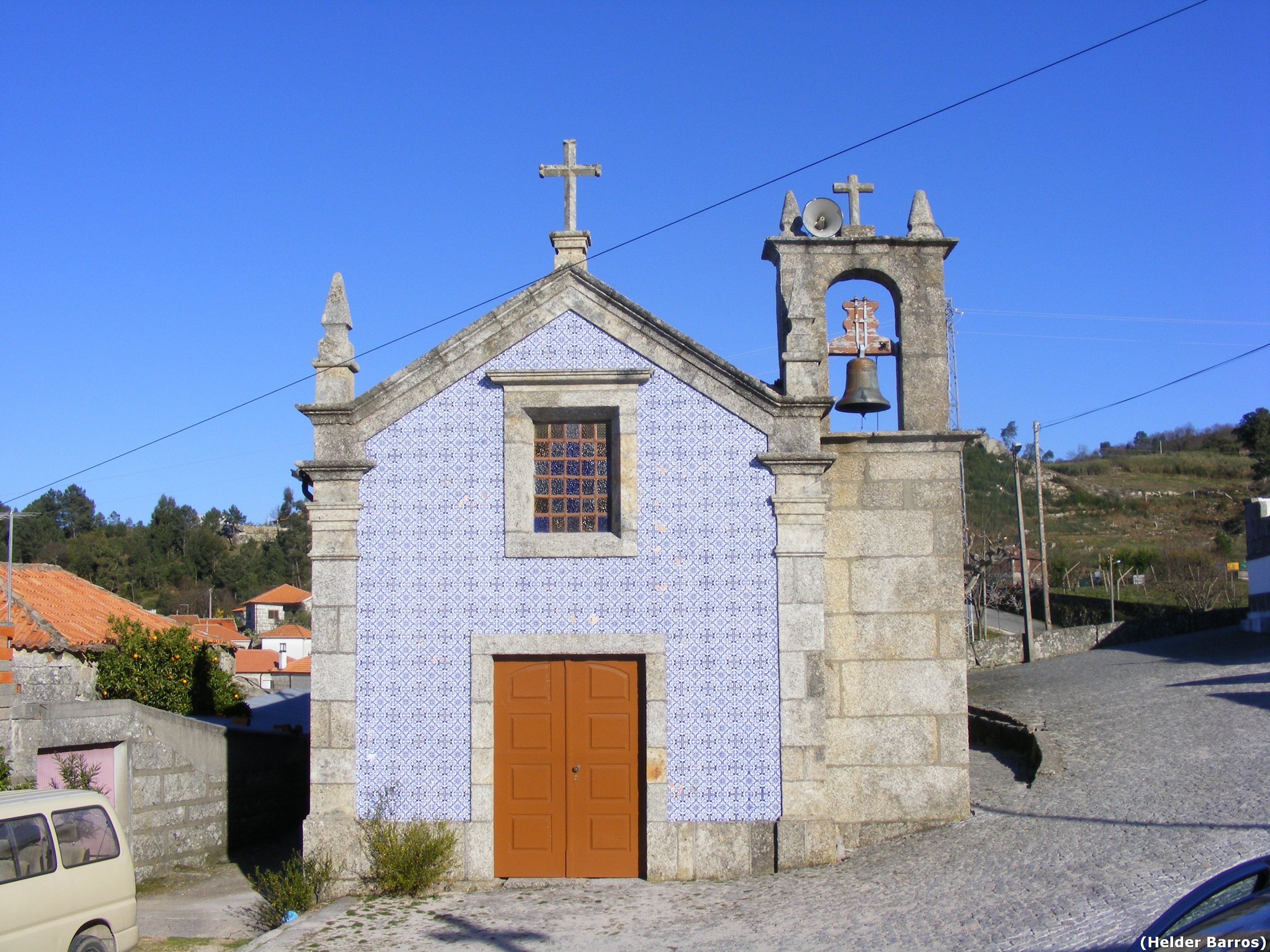 Amarante Igreja Matriz de Bustelo